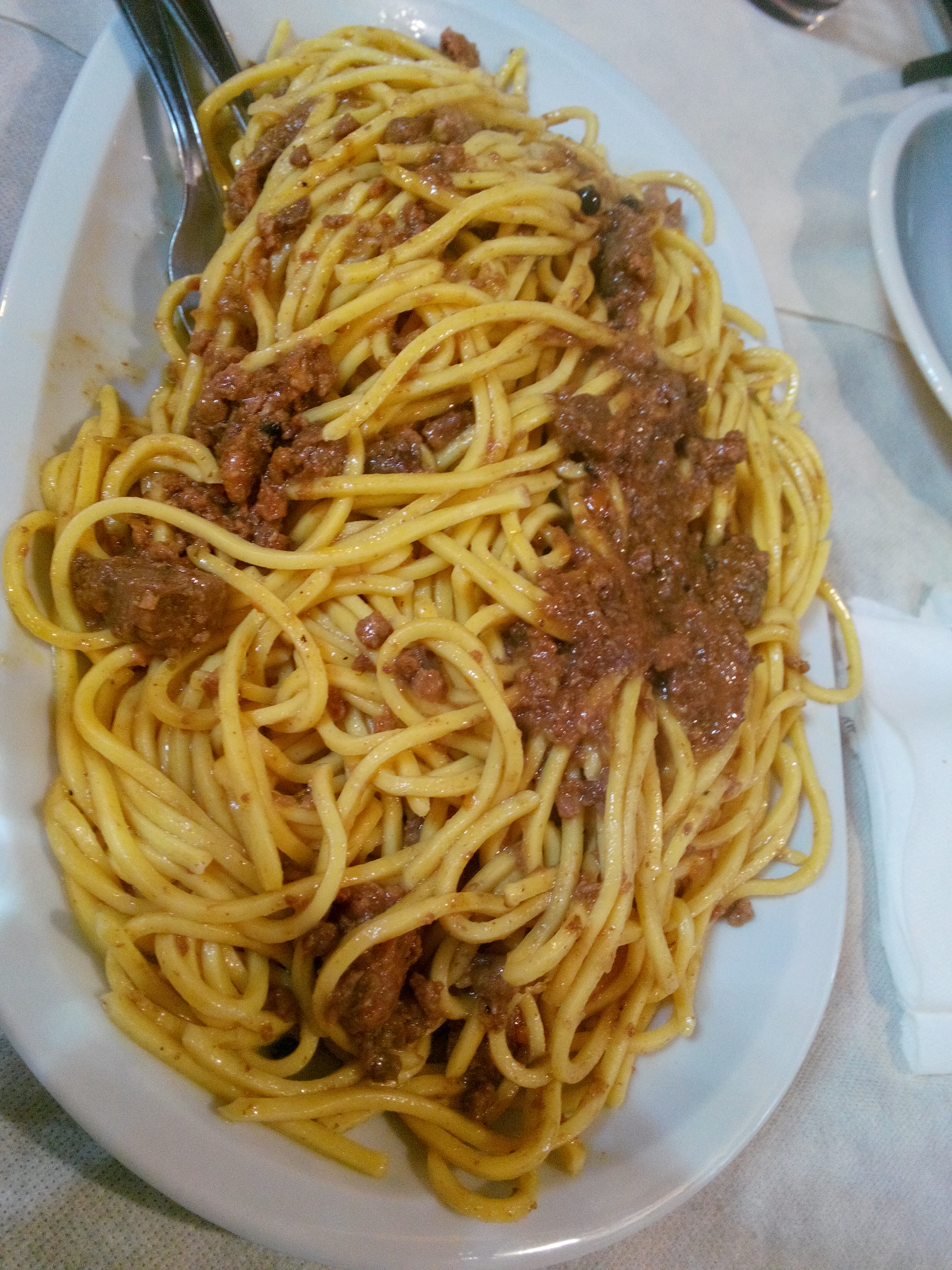 Pici al ragù di cinghiale